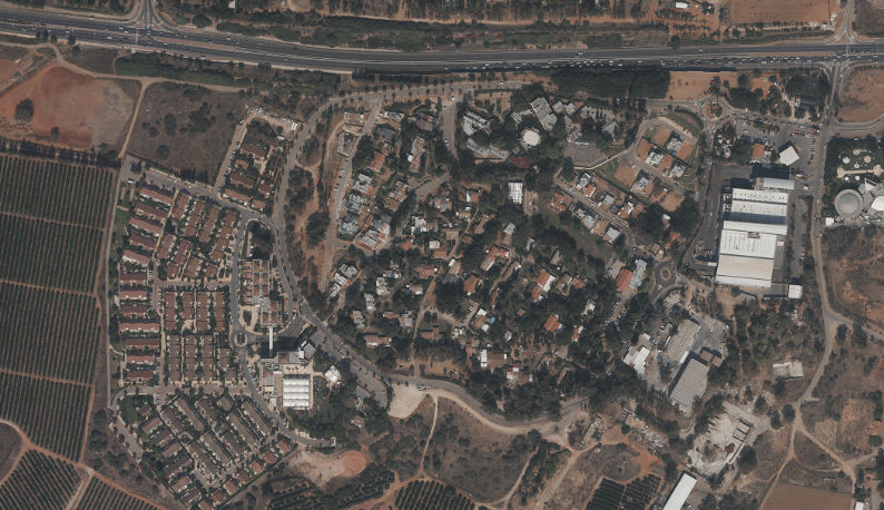 תצלום אוויר קיבוץ תל יצחק